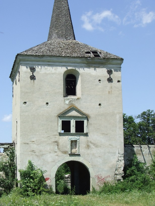 Kornis Castle in Mănăstirea, Cluj County, Romania